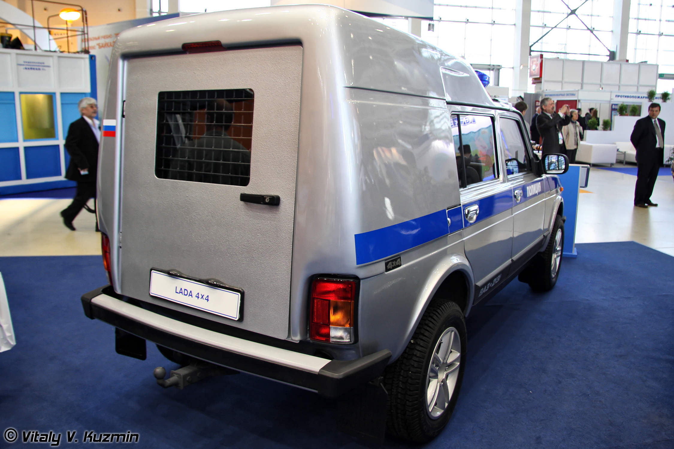 LADA 4x4 МВД (LADA 4x4 MVD)